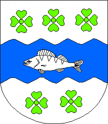 Koosa osavald vapp